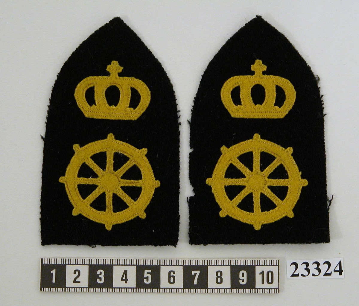 Fotografi av granatformad yrkesbeteckning (ett par) i svart textil försedd med ratt (vilken betecknar däcksavdelningen) samt krona i gult kläde (gradbeteckning för flaggkorpral)